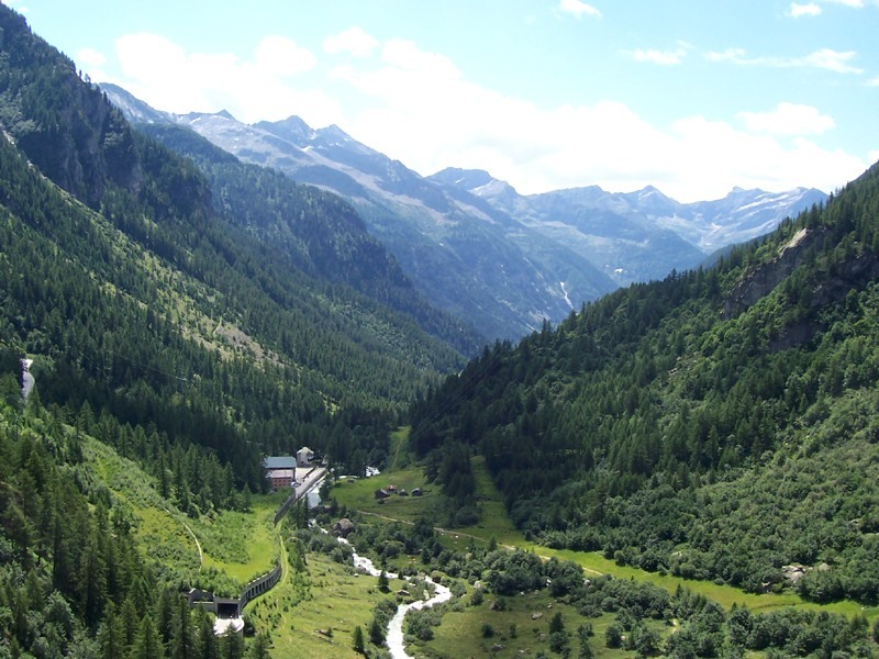 Val Formazza vista dalla Cascata del Toce